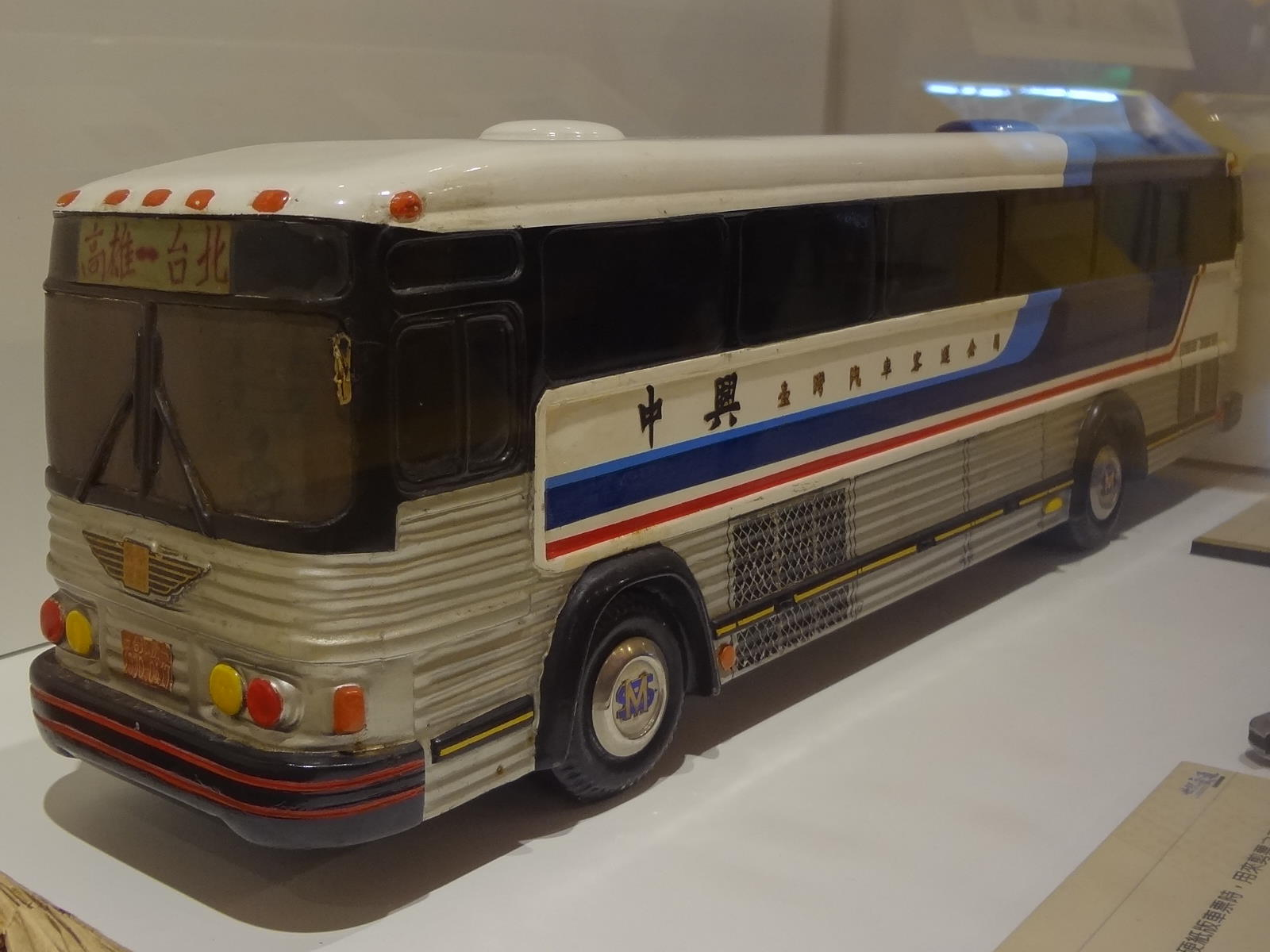 臺灣汽車客運公司中興號模型左前方外觀